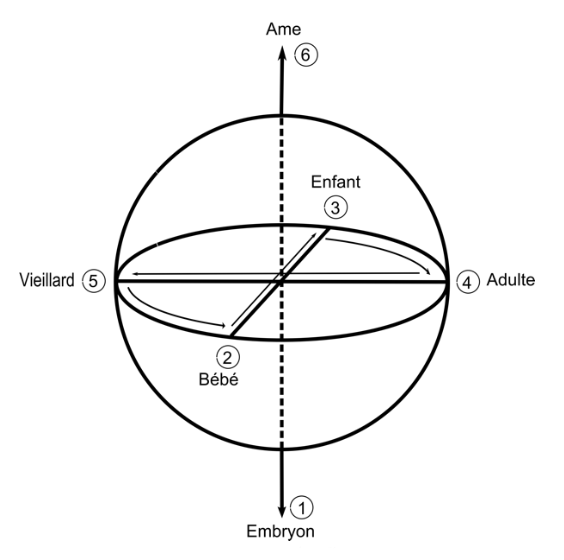 Une application de la structure absolue aux étapes de la vie individuelle.